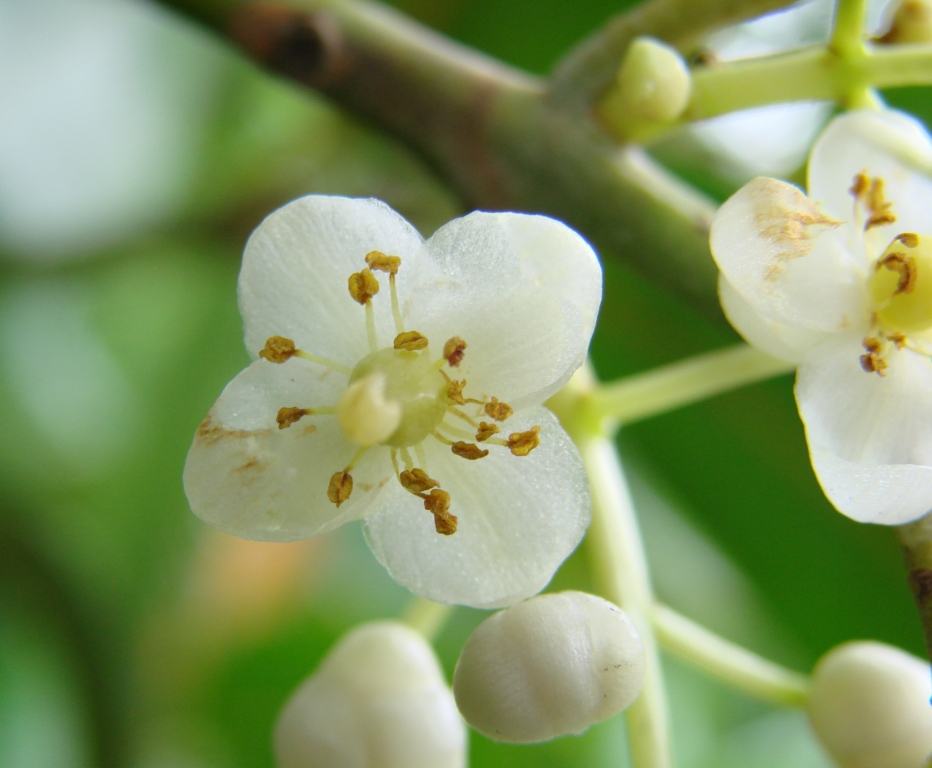 Calophyllum brasiliense - CLUSIACEAE Parque Nacional de Brasília - Brasília - Distrito Federal - Brasil.